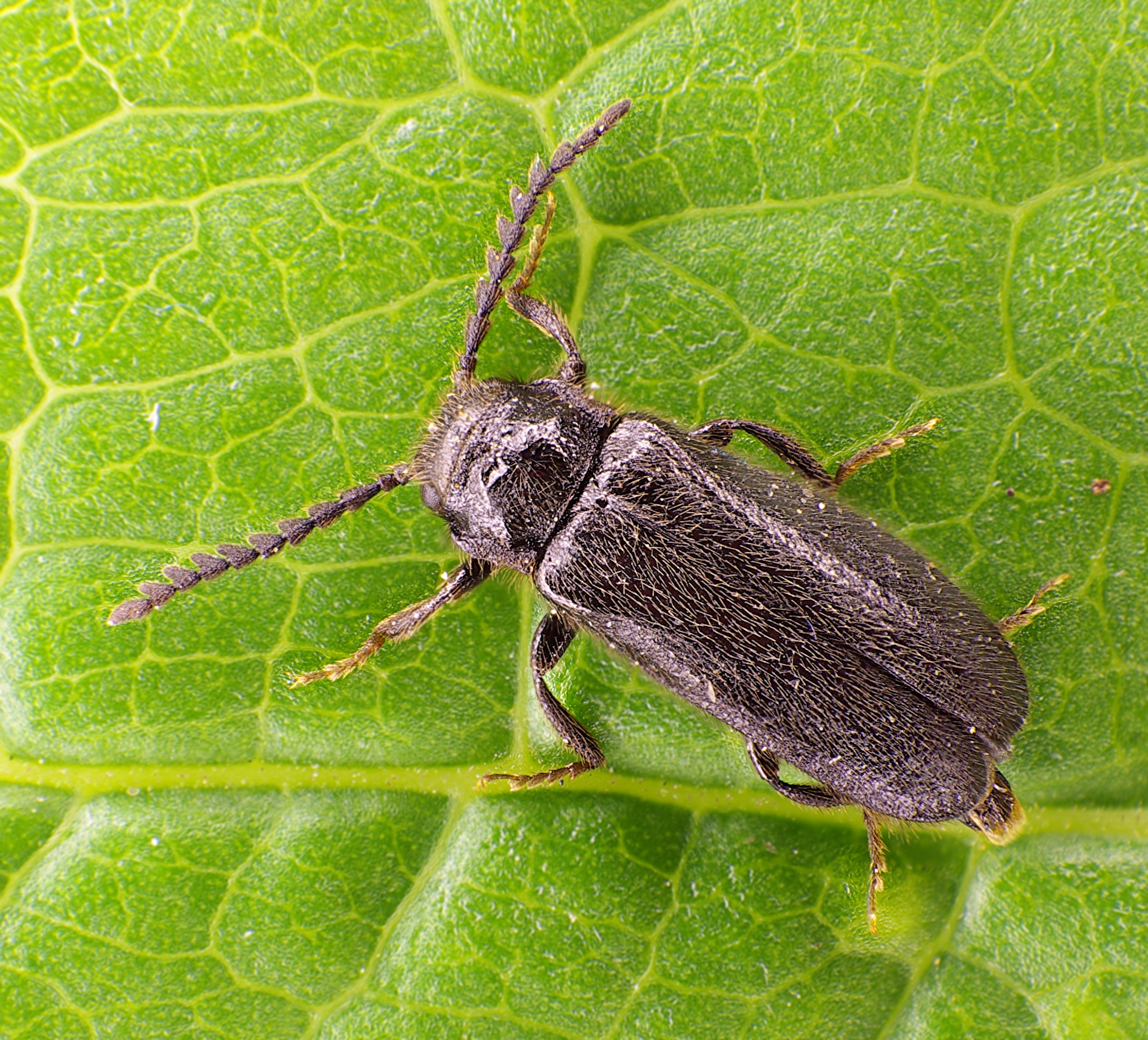 Drilus concolor, Männchen, von Süddeutschland, zwischen Tuttlingen und Rottweil, 700 müM am 18.Juni 2014